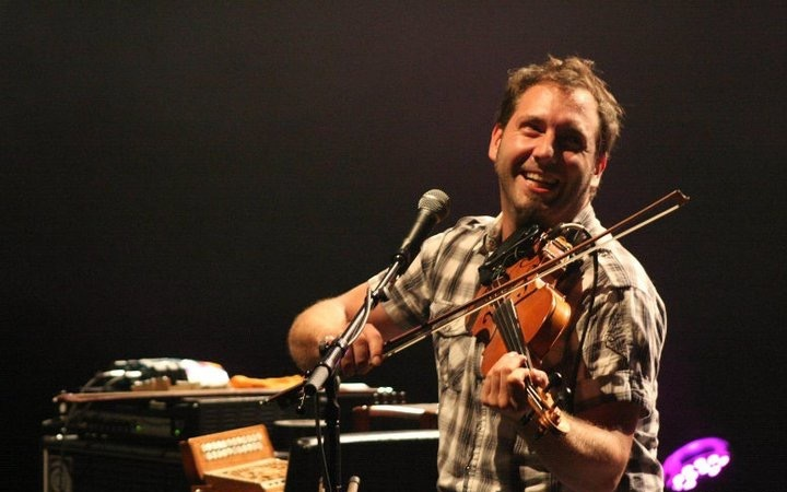 Olivier Demers en spectacle